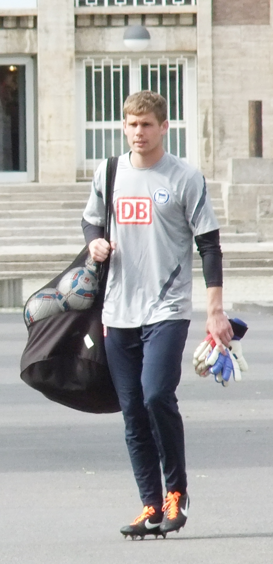 Thomas Kraft, 2011